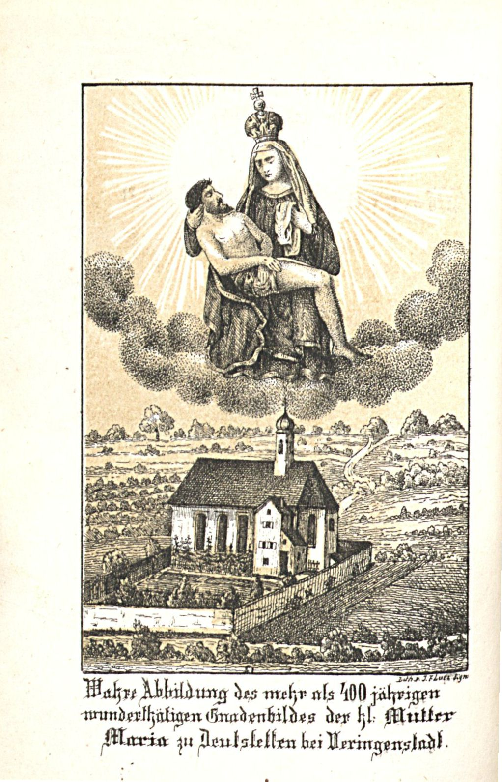 Ansicht der Wallfahrtskirche Maria Deutstetten mit Friedhof und Einsiedlerklause in Veringenstadt. Stich aus dem Buch: Die Wallfahrt Maria Deutstetten bei Veringenstadt. Buchdruckerei C. Tappen, Sigmaringen. Ca. 1880.